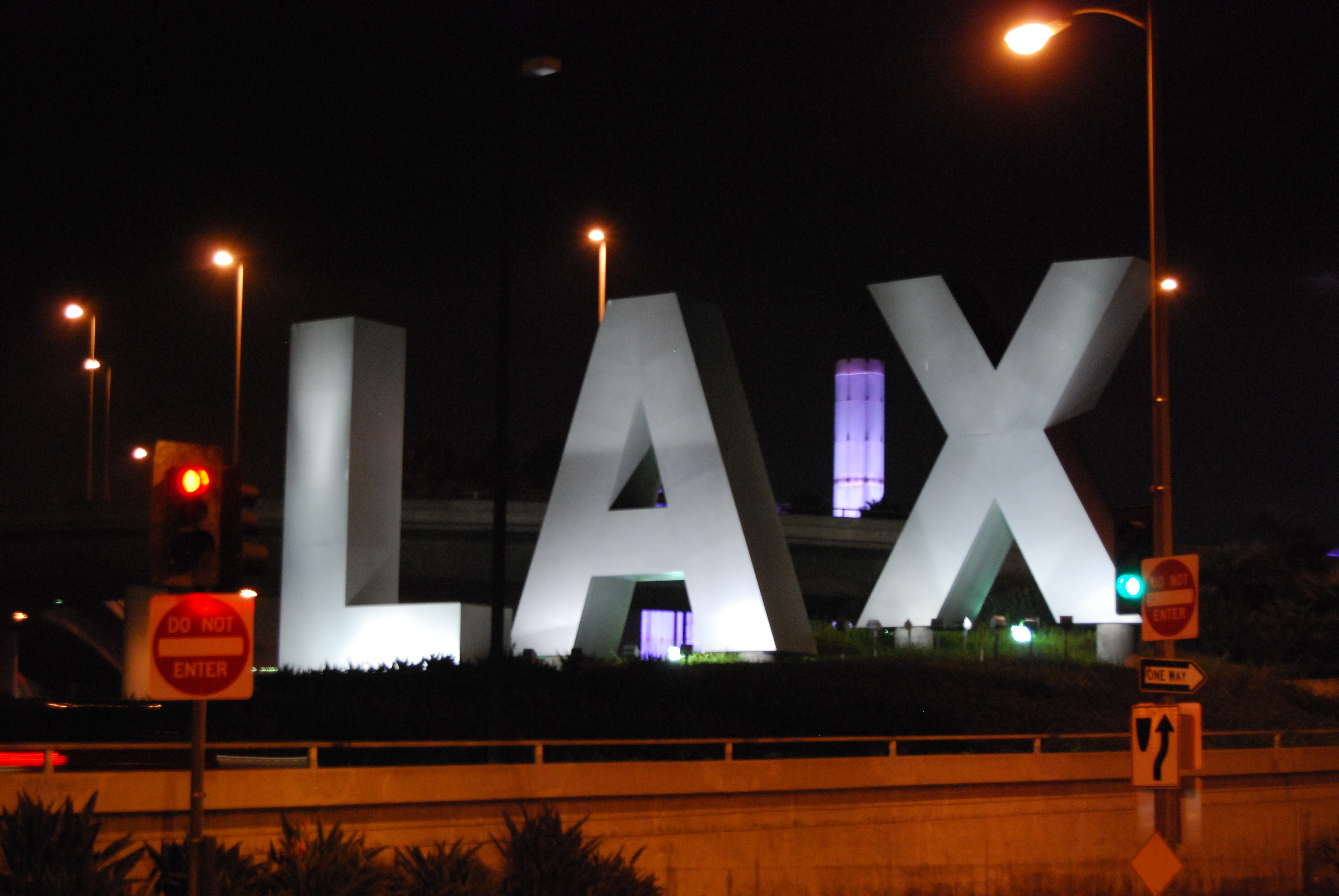 LAX